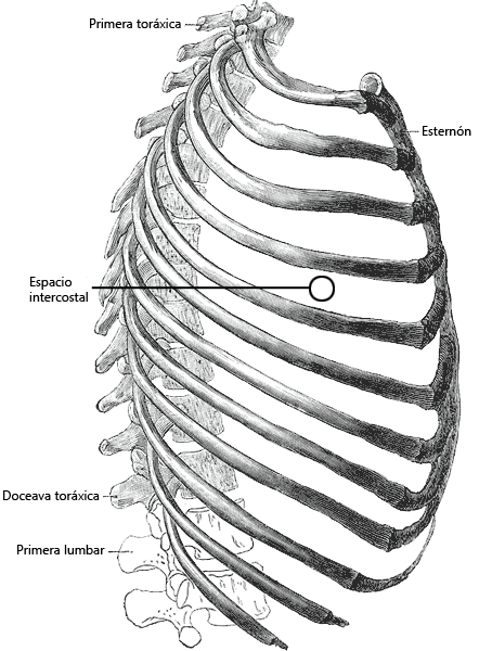 Los espacios entre costillas es denominado espacio intercostal. Basados en, wikipedia: Gray114.png